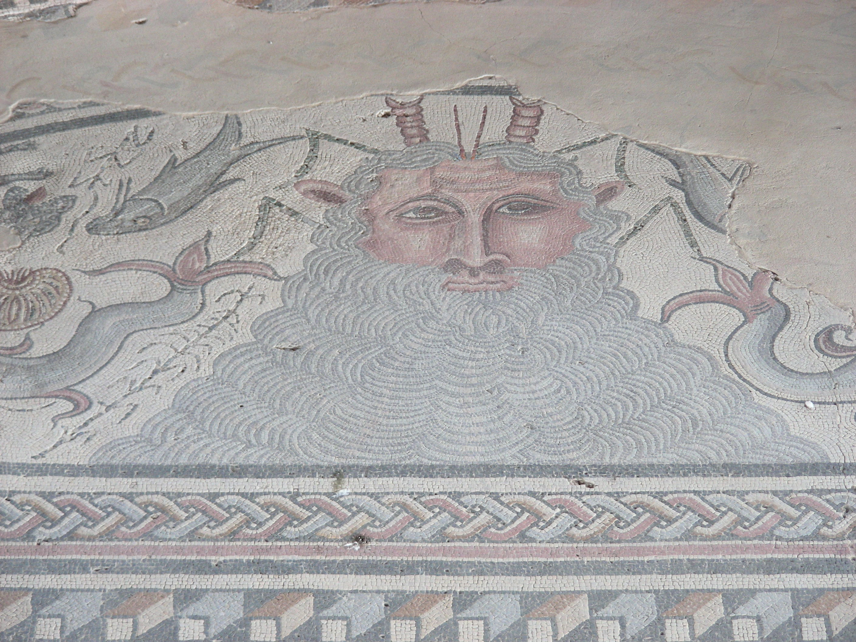 Emblematisches Mosaik von Neptun im archäologischen Park zu Carranque